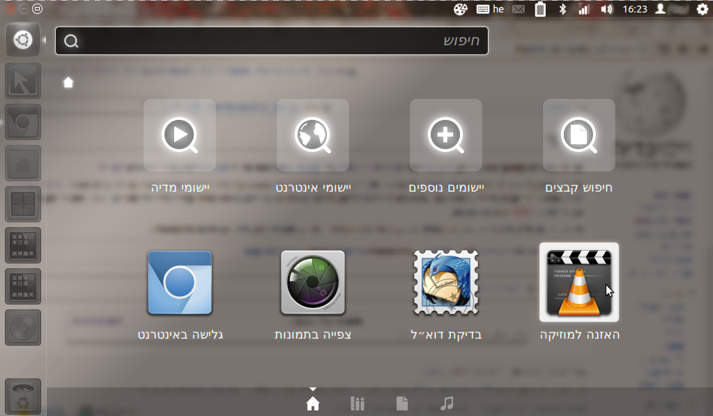 ממשק יוניטי עברי